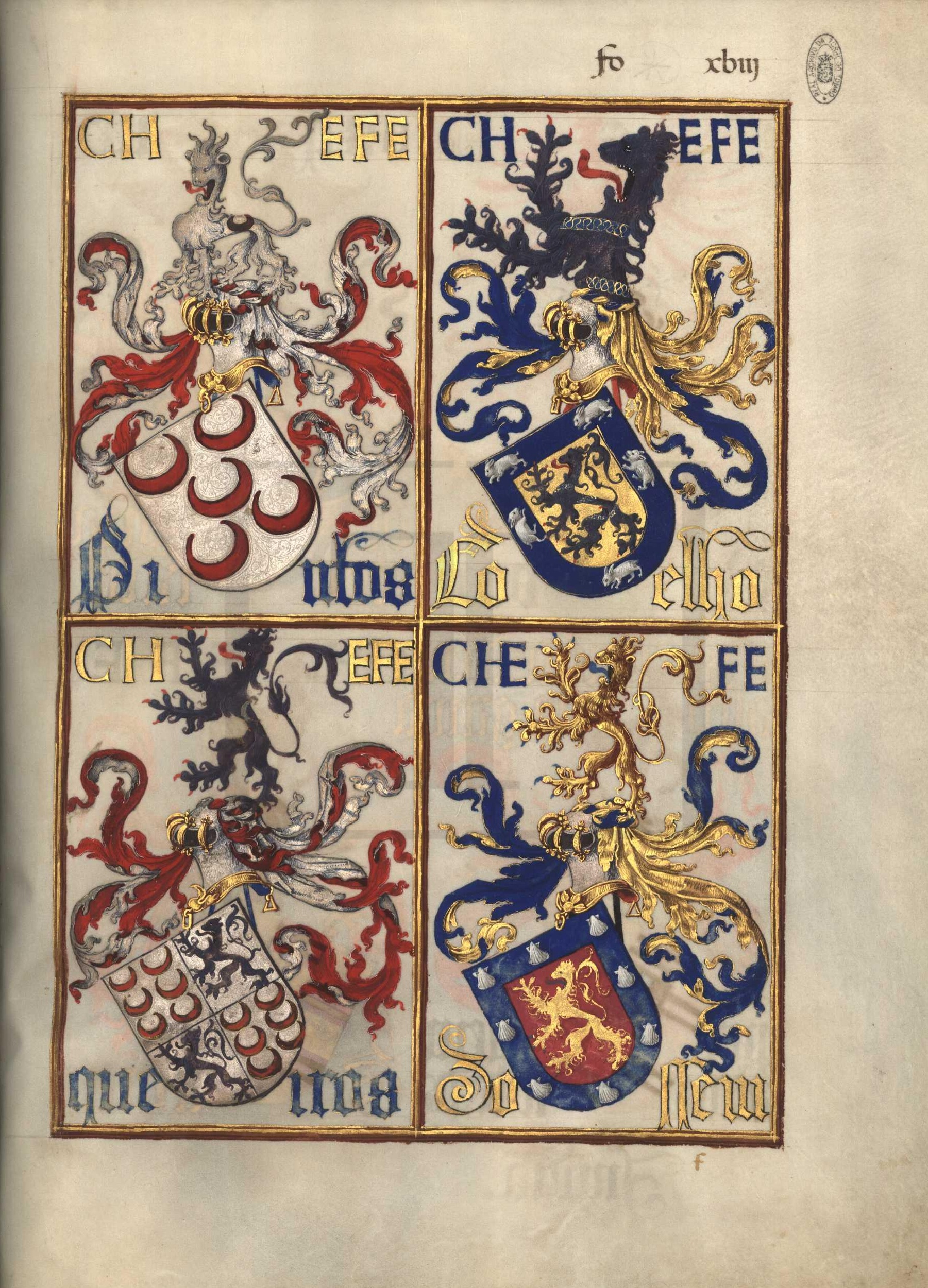 Livro da Nobreza e Perfeiçam das Armas (fl 18)